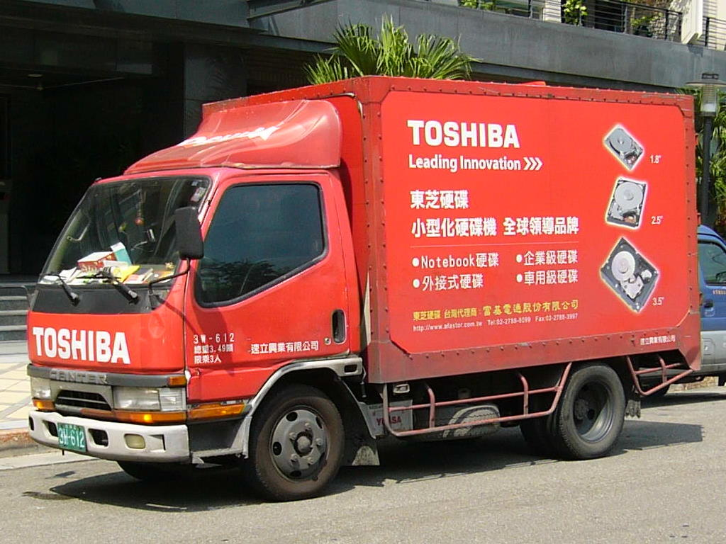 富基電通經銷商的三菱堅達貨車3W-612，車身貼東芝硬碟廣告。